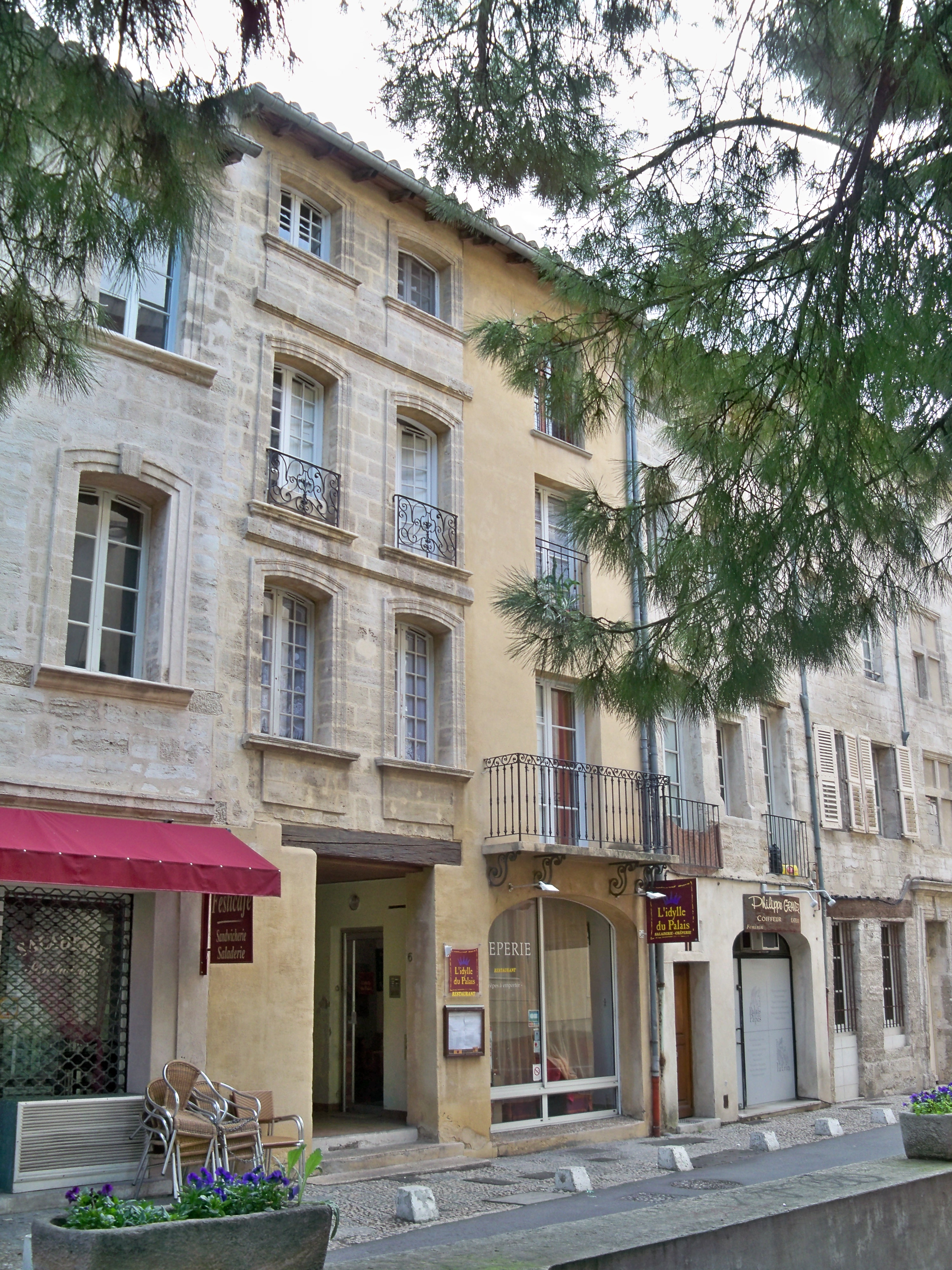 Immeuble rue de la Balance à Avignon (84)